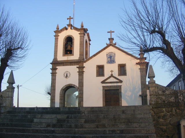 Amarante Figueiró Santa Cristina Igreja